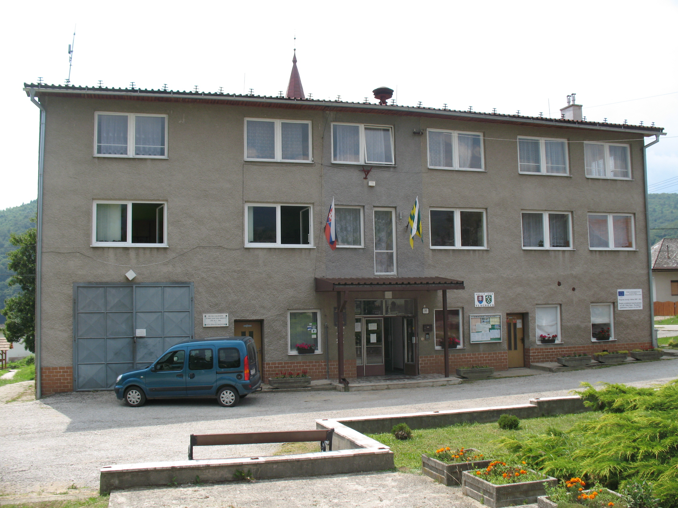 Oláhpatak